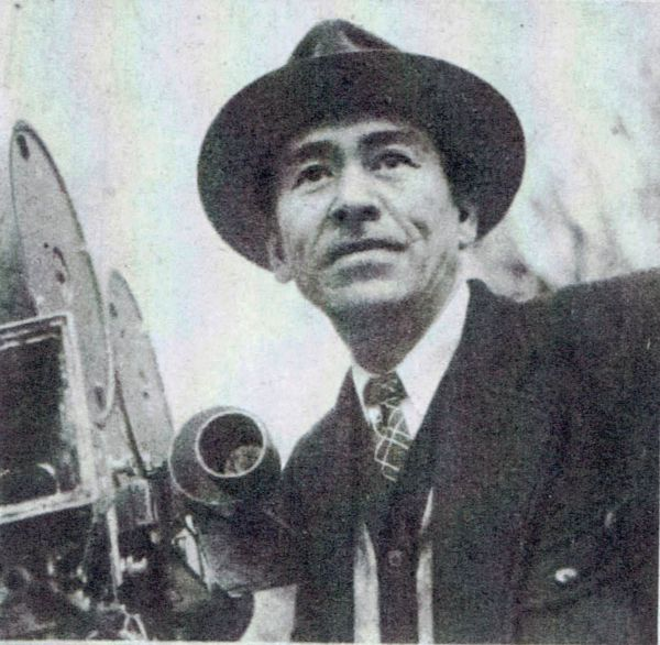 キネマ旬報社『キネマ旬報』第13号（1947）より島耕二